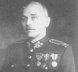 Alois Machačík (1888 - 1943), Československý voják, generál.